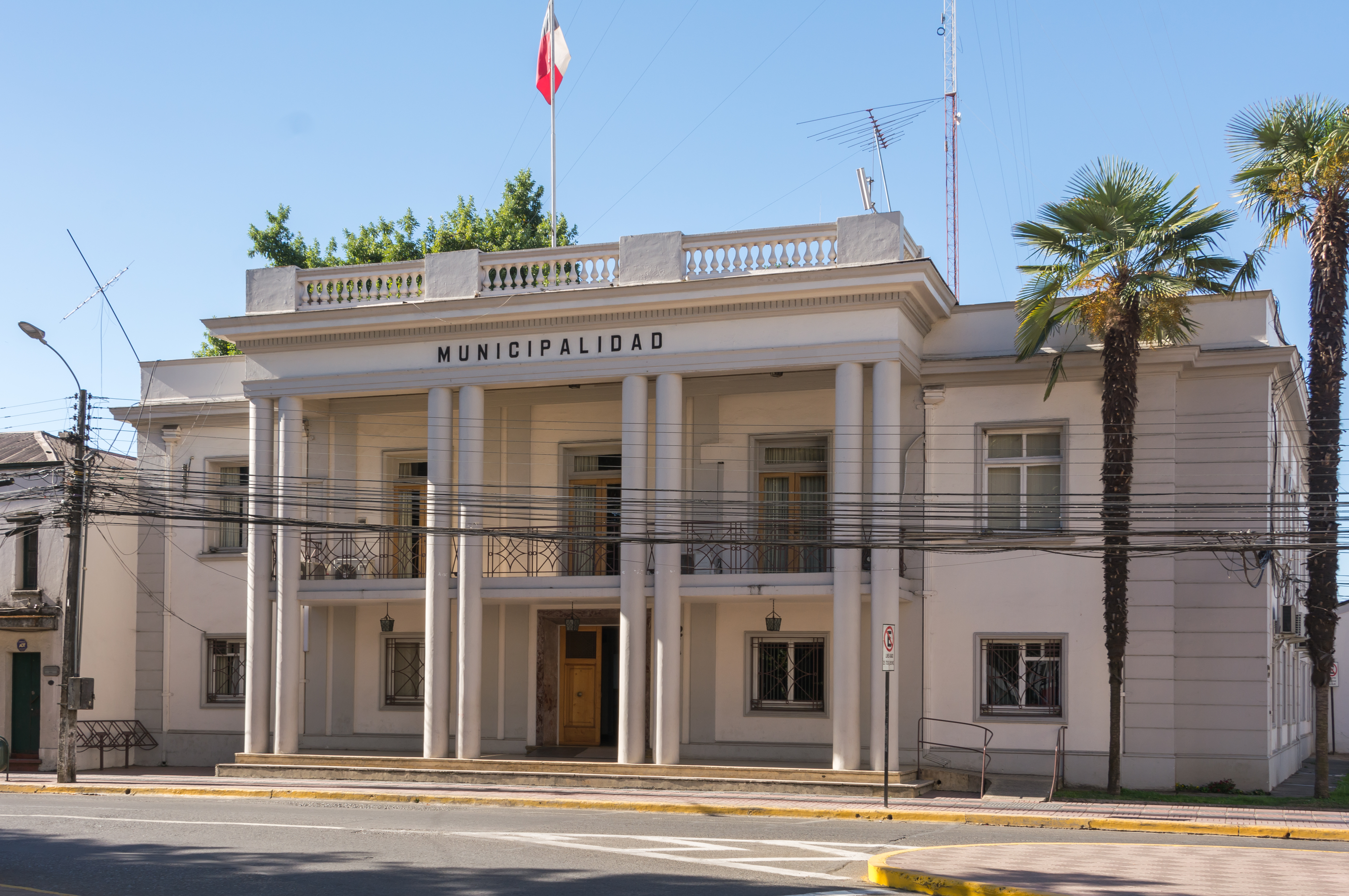 Municipalidad de Linares, Región del Maule, Chile.